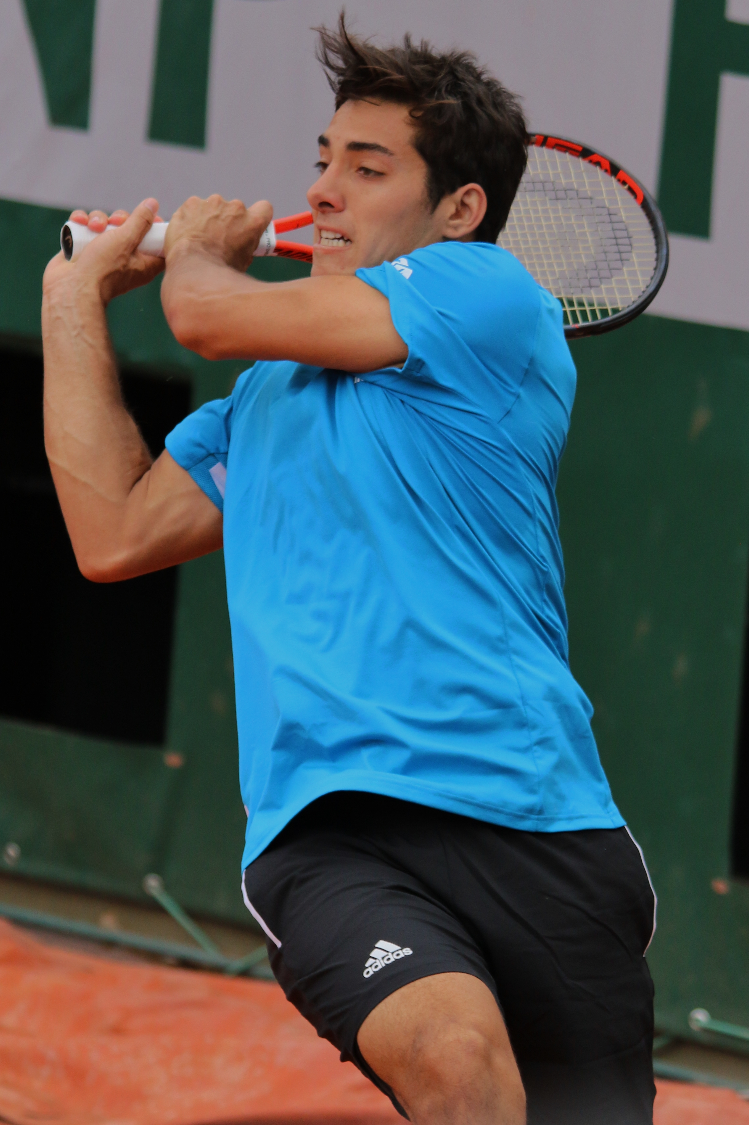 Garin RG19 (1)